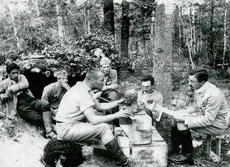 Михайло Гаврилко ліпить погруддя Василя Дідушка. Біля дерева сидьма Петро Дідушок, на вході в землянку Василь Кучабський, праворуч у мазепинці Федір Черник.